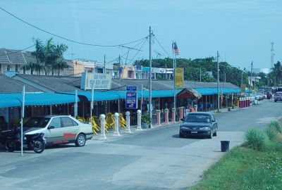 Gerai - gerai di Pekan Sekinchan, Selangor.